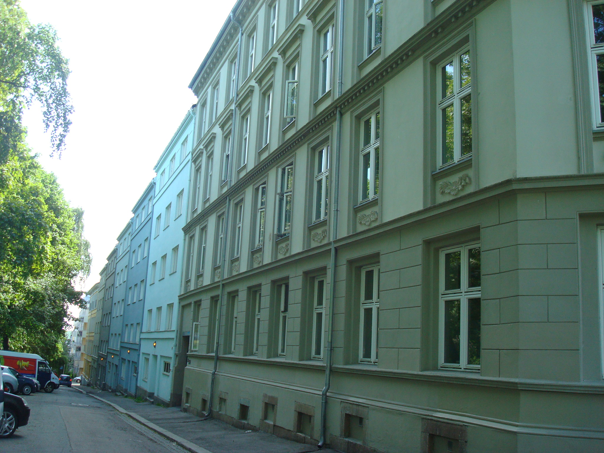 Øvre del av Valdresgata i Oslo (2014).